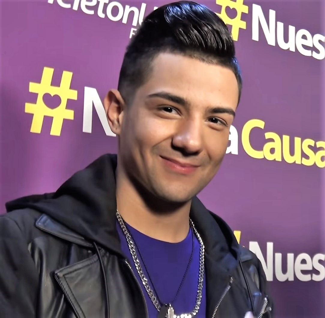 Luís Coronel revela lo que le enamoró de su novia Cristina Bern y habla de su futuro con ella Dulce Osuna &